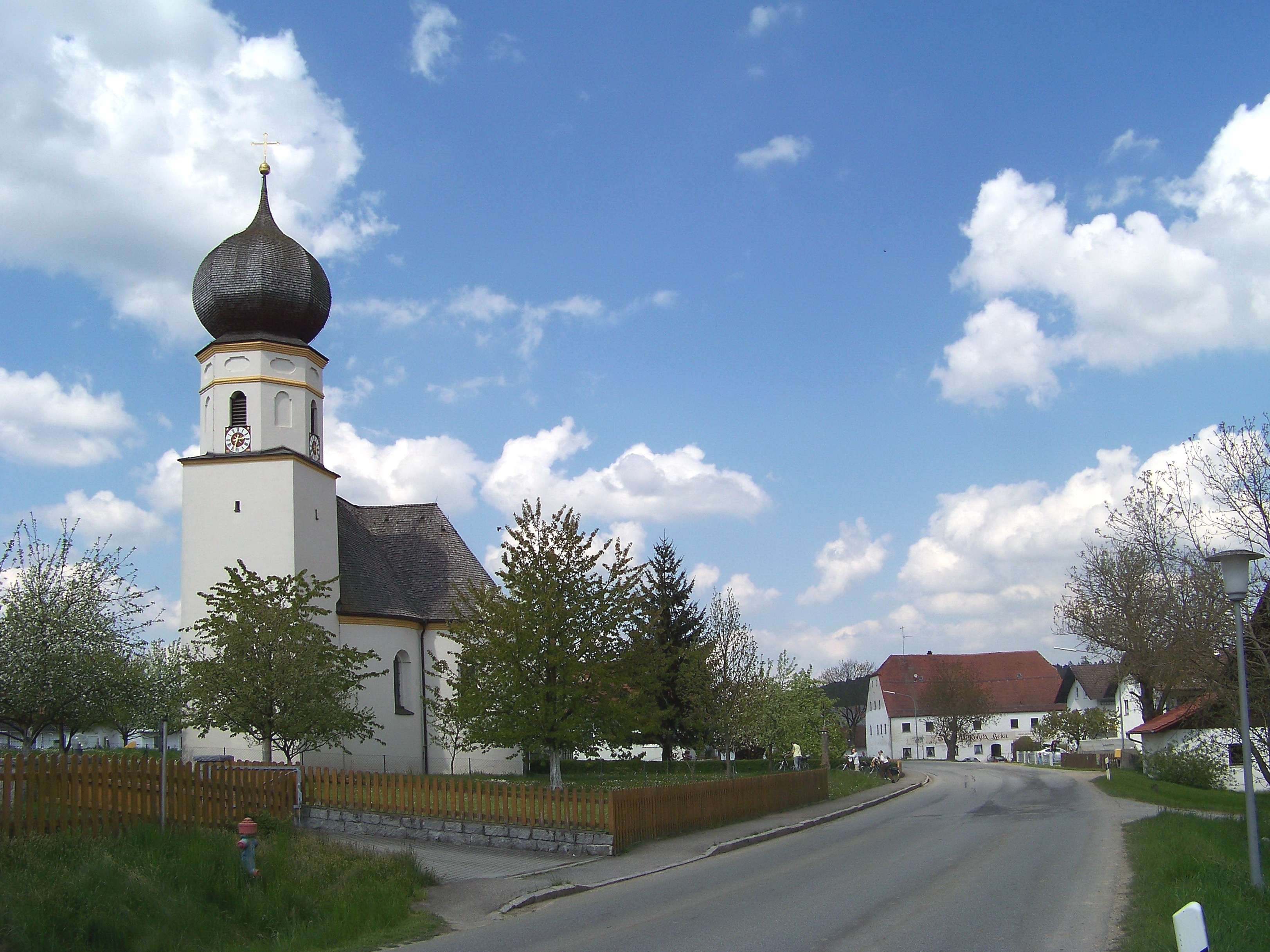 Filialkirche St. Christoph in Gschwendt. Dreipassförmiger Zentralbau mit Anbau und Südturm, 1675; mit Ausstattung. Im Hintergrund das historische Wirtshaus "Zum Räuber Heigl".